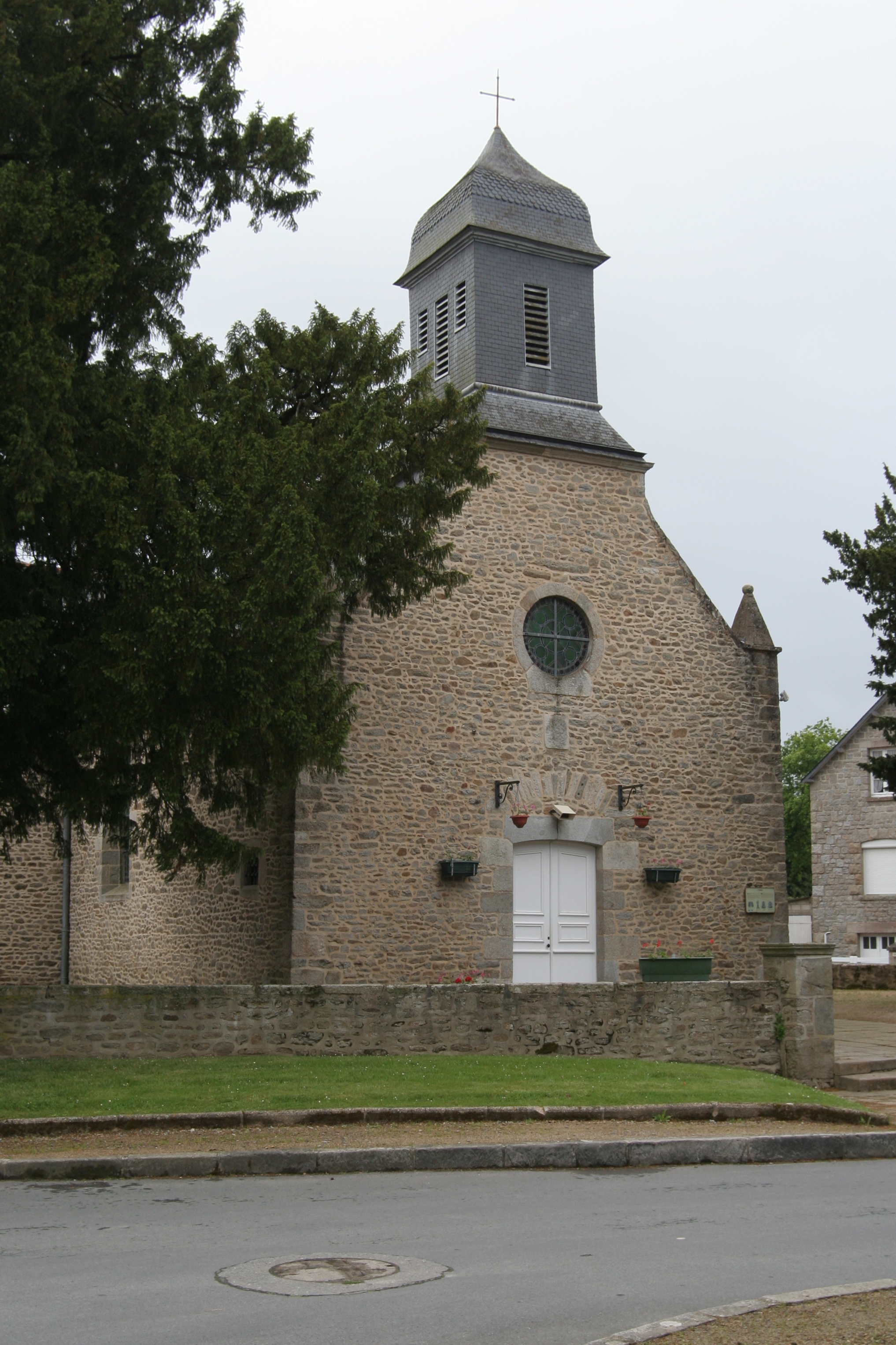 Église Saint-Samson de Saint-Samson-sur-Rance.